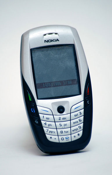 Nokia 6600